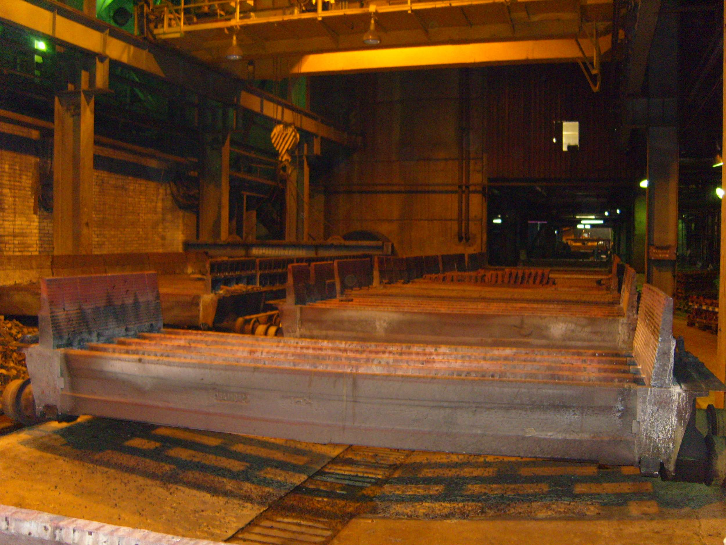 Обжиговая тележка (паллета)